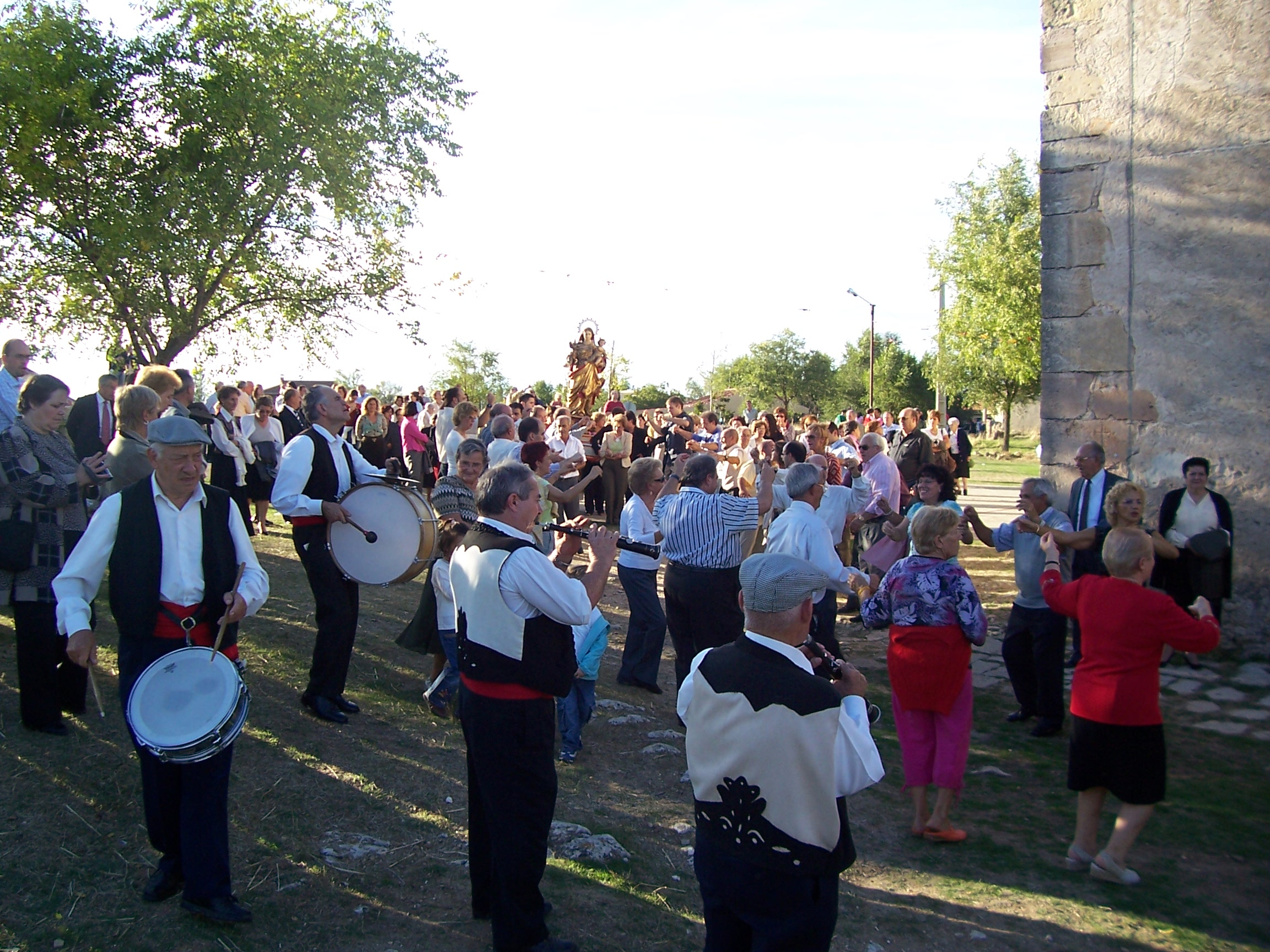 Fiestas Octubre "Procesion Virgen del Rosario"